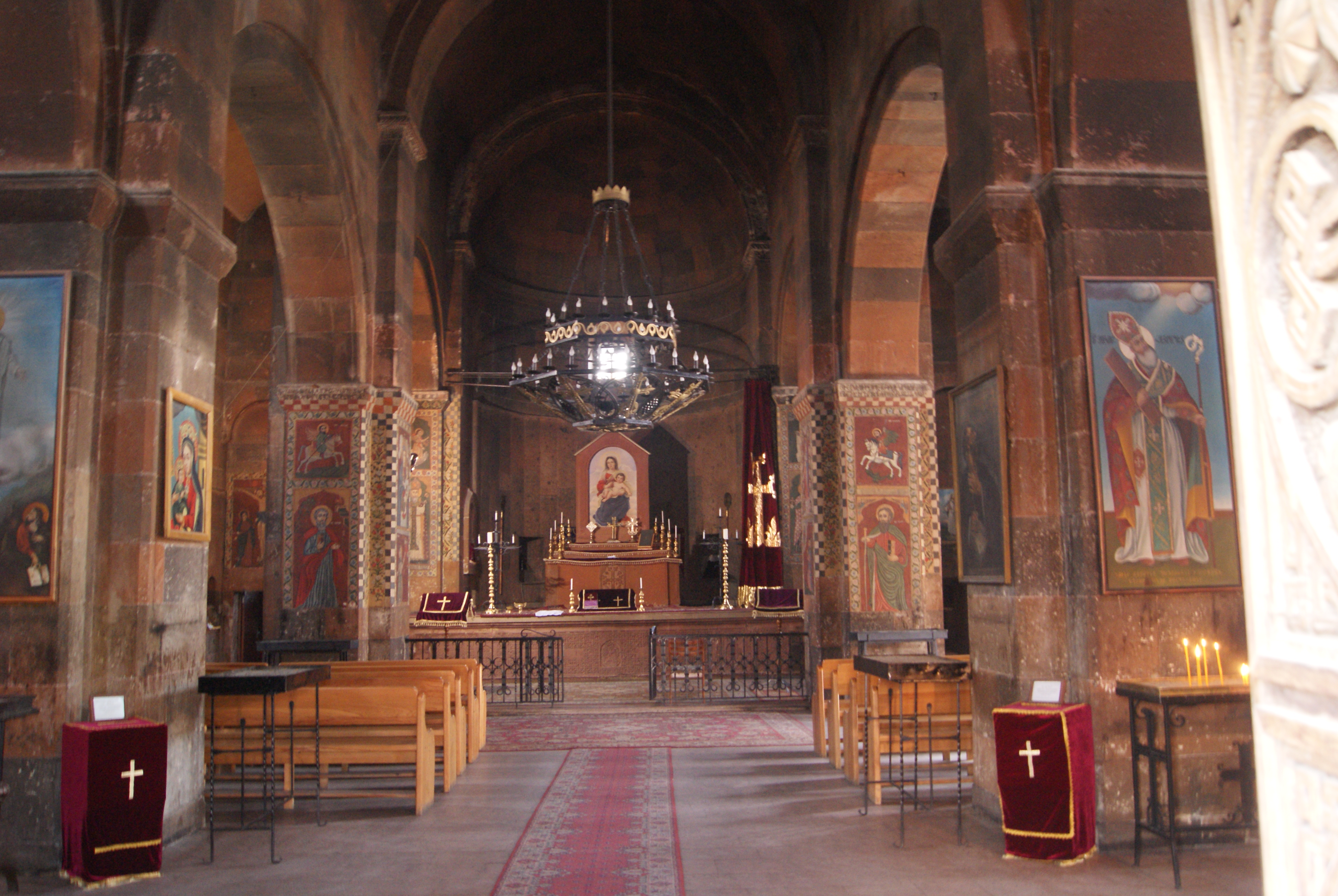 Որմնանկար «Աստվածամայրը մանկան հետ երկու հրեշտակներով», Սուրբ Հակոբ 12/6.4